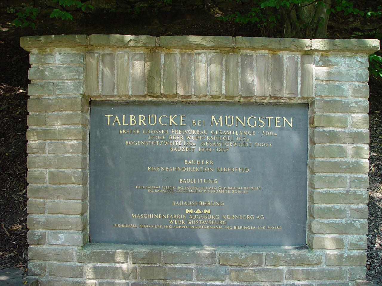 Gedenktafel unterhalb der Müngstener Brücke Fotograf: Michael Tettinger, Solingen